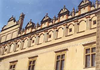 Attyka